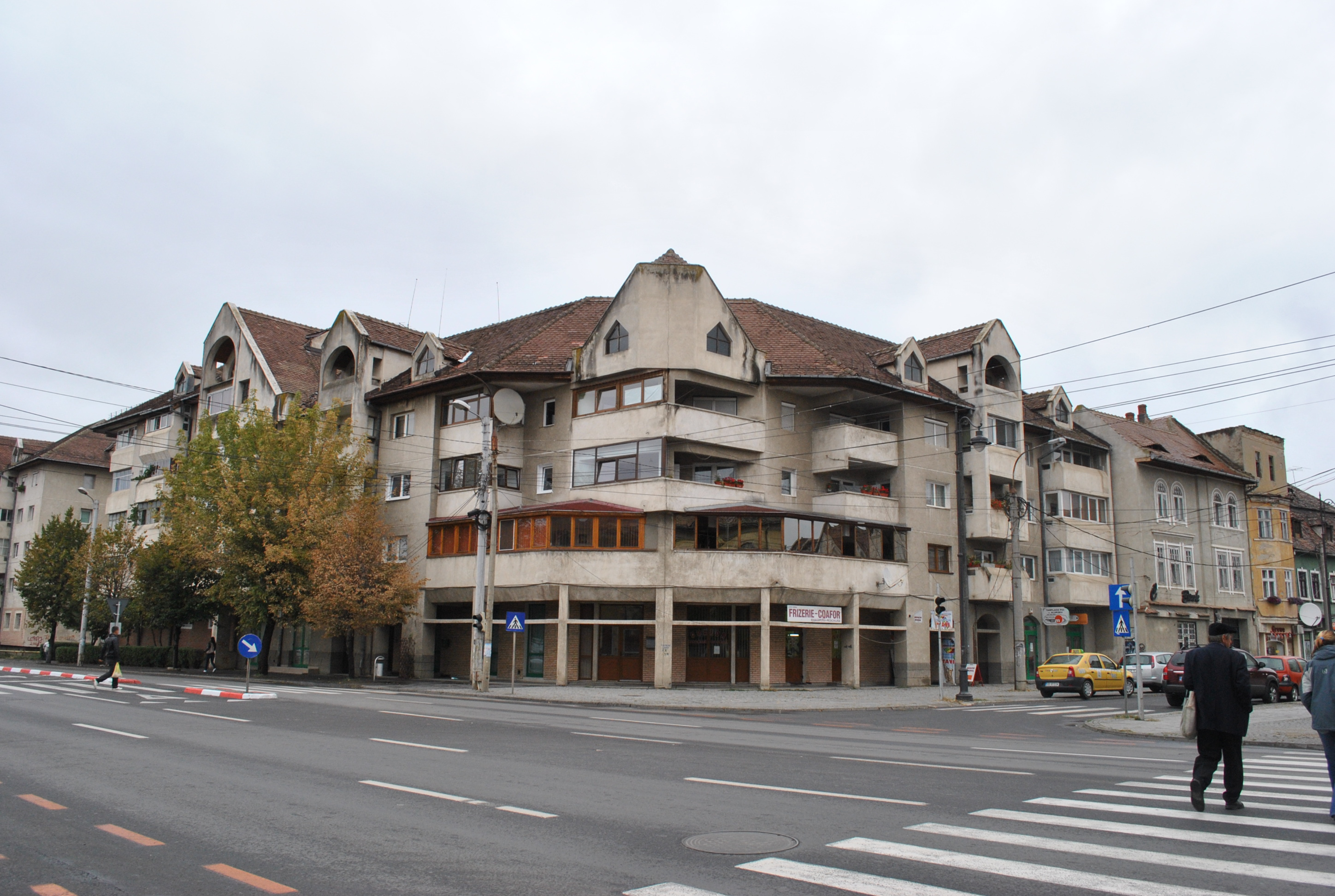 Fosta biserică a minoriților, sec. XVII, transf. 1926 -nu mai exista in prezent